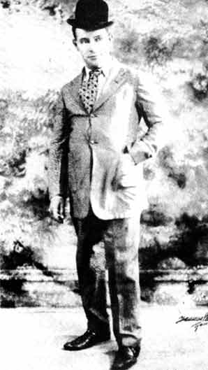 Olivier Guimond père en 1930 au Théâtre National, Montréal